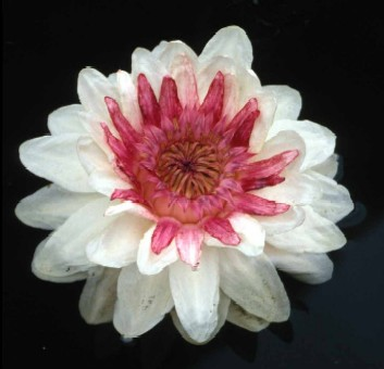 Victoria cruziana flower